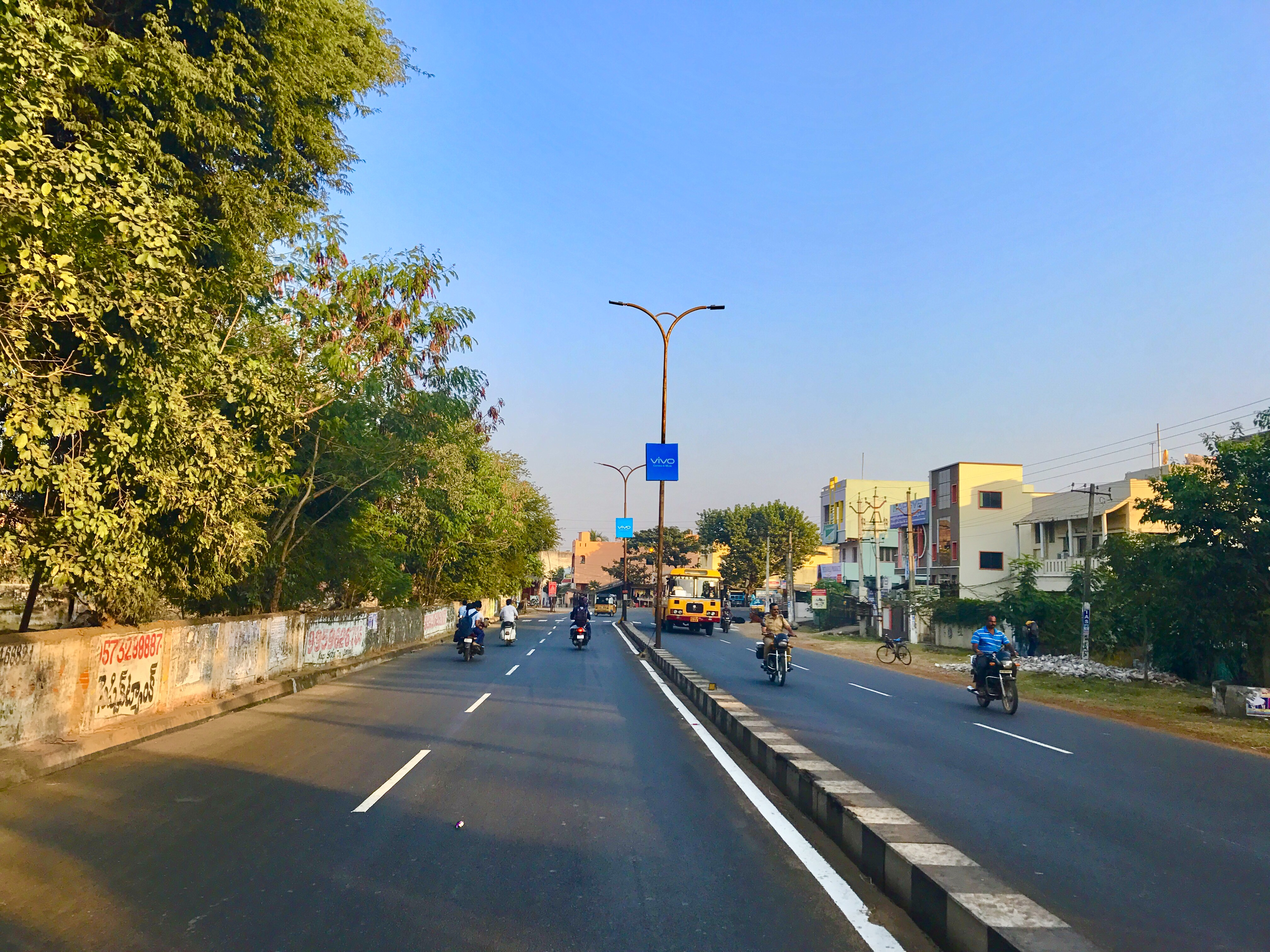 SH 26 leading to Visakhapatnam from Vizianagaram